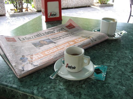 Zelf gemaakte foto / Photo made by myself